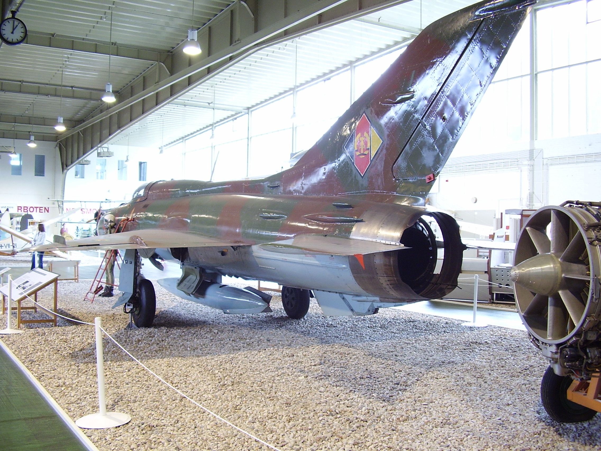 MiG-21PF Luftwaffenmuseum der Bundeswehr; Airforce Museum of the Bundeswehr; Berlin-Gatow